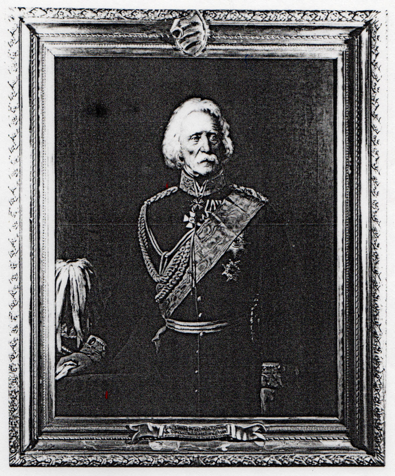 Ernst Heinrich Adolf von Pfuel (* 3. November 1779 auf Gut Jahnsfelde, heute Ortsteil von Müncheberg, Landkreis Märkisch-Oderland, Brandenburg; † 3. Dezember 1866 in Berlin, beigesetzt auf Gut Jahnsfelde) war ein königlich-preußischer General der Infanterie, ein Reformer des Militärsports und kurzzeitig Gouverneur von Berlin sowie preußischer Ministerpräsident und Kriegsminister.